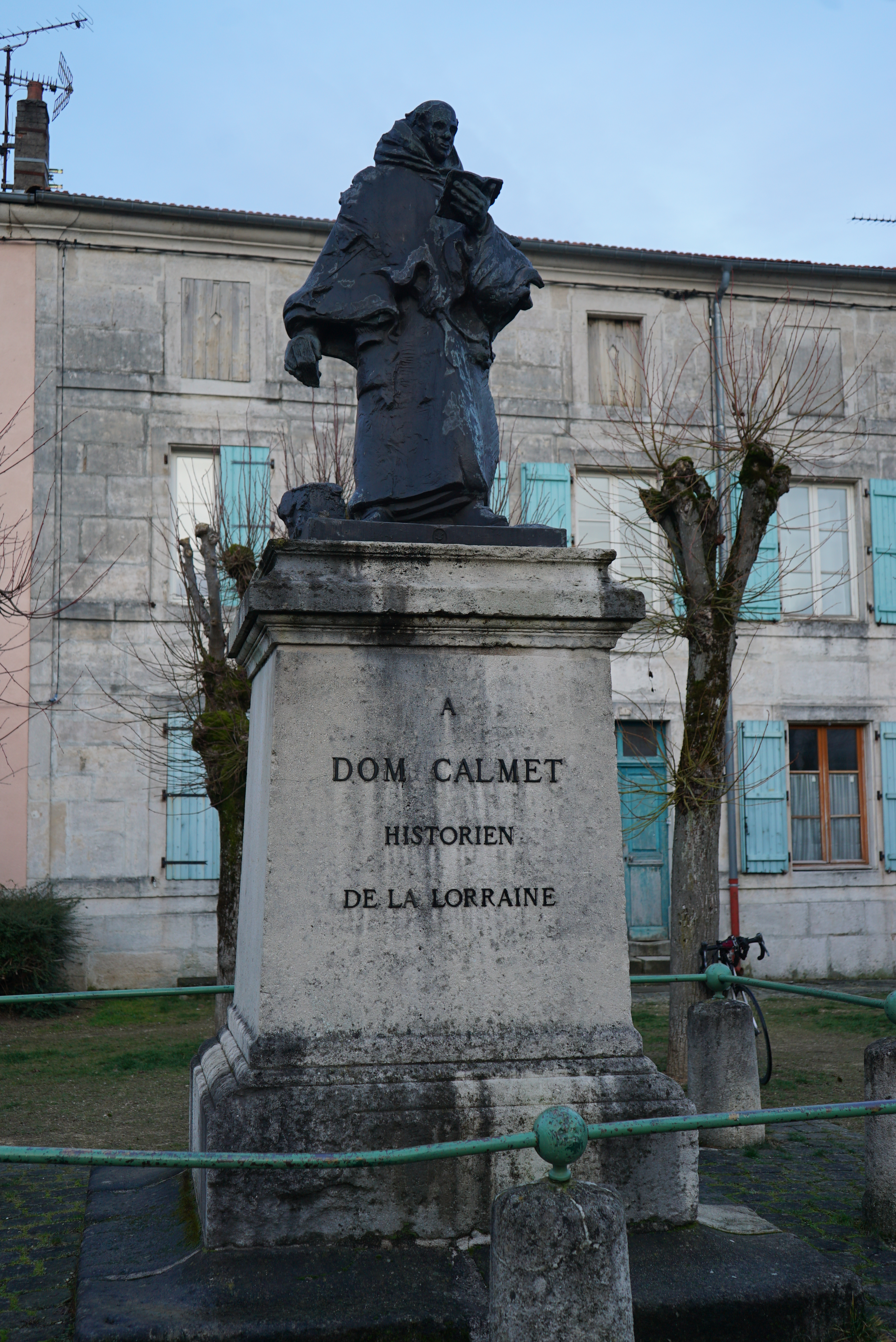 à Commercy.